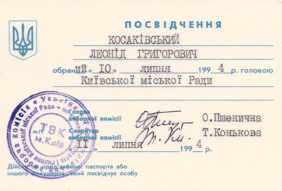 Посвідчення про обрання Леоніда Григоровича Косаківського головою Київської міської ради